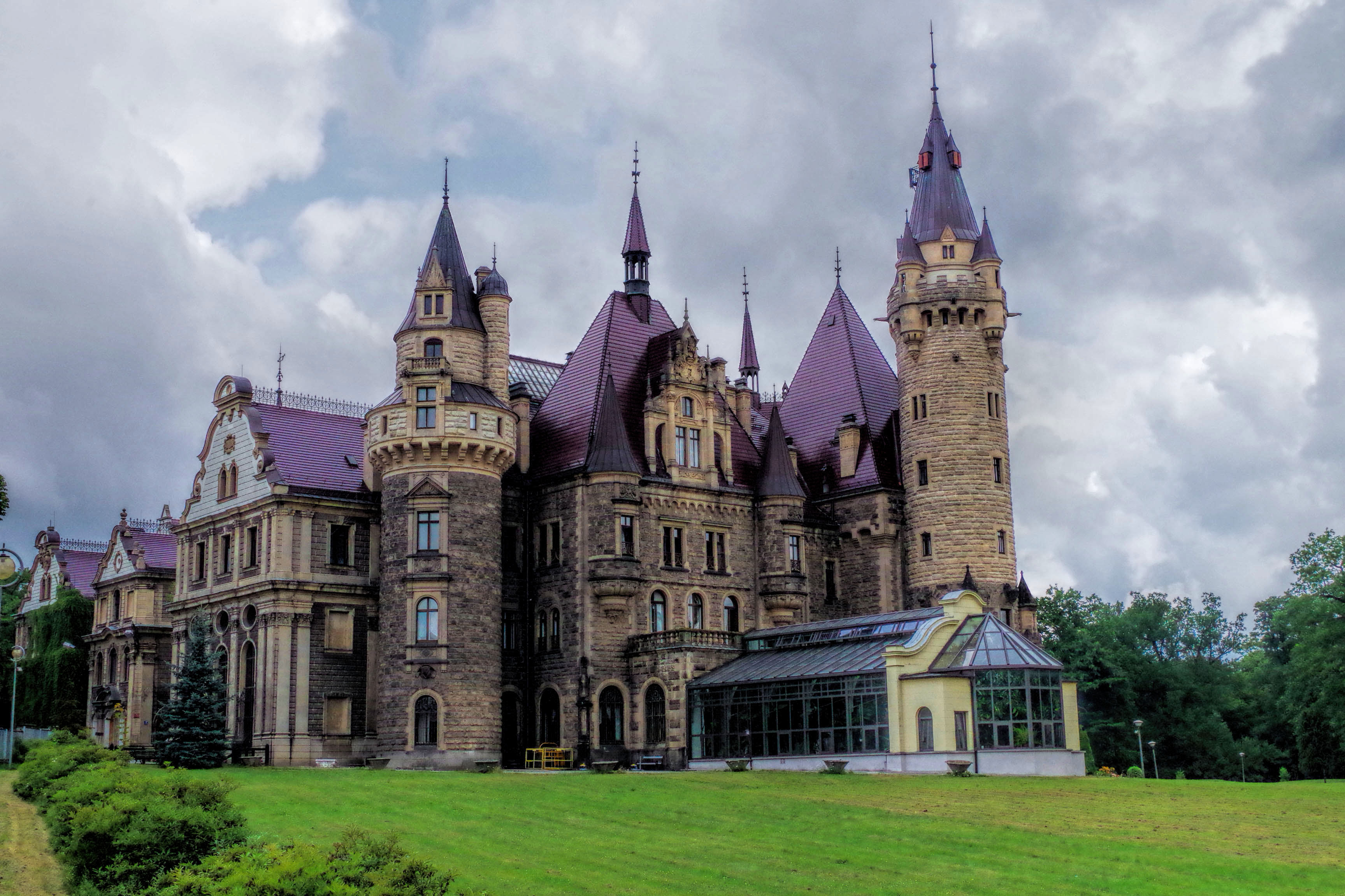 Moszna, zespół pałacowy, XVIII, XX